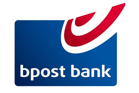 logo de Bpost Bank